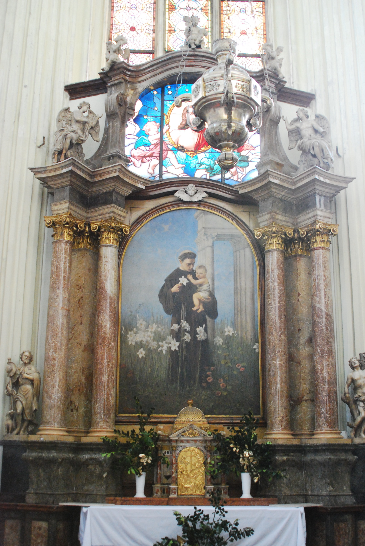 Altar in der Antonius-Kapelle in der Minoritenkirche in Wien